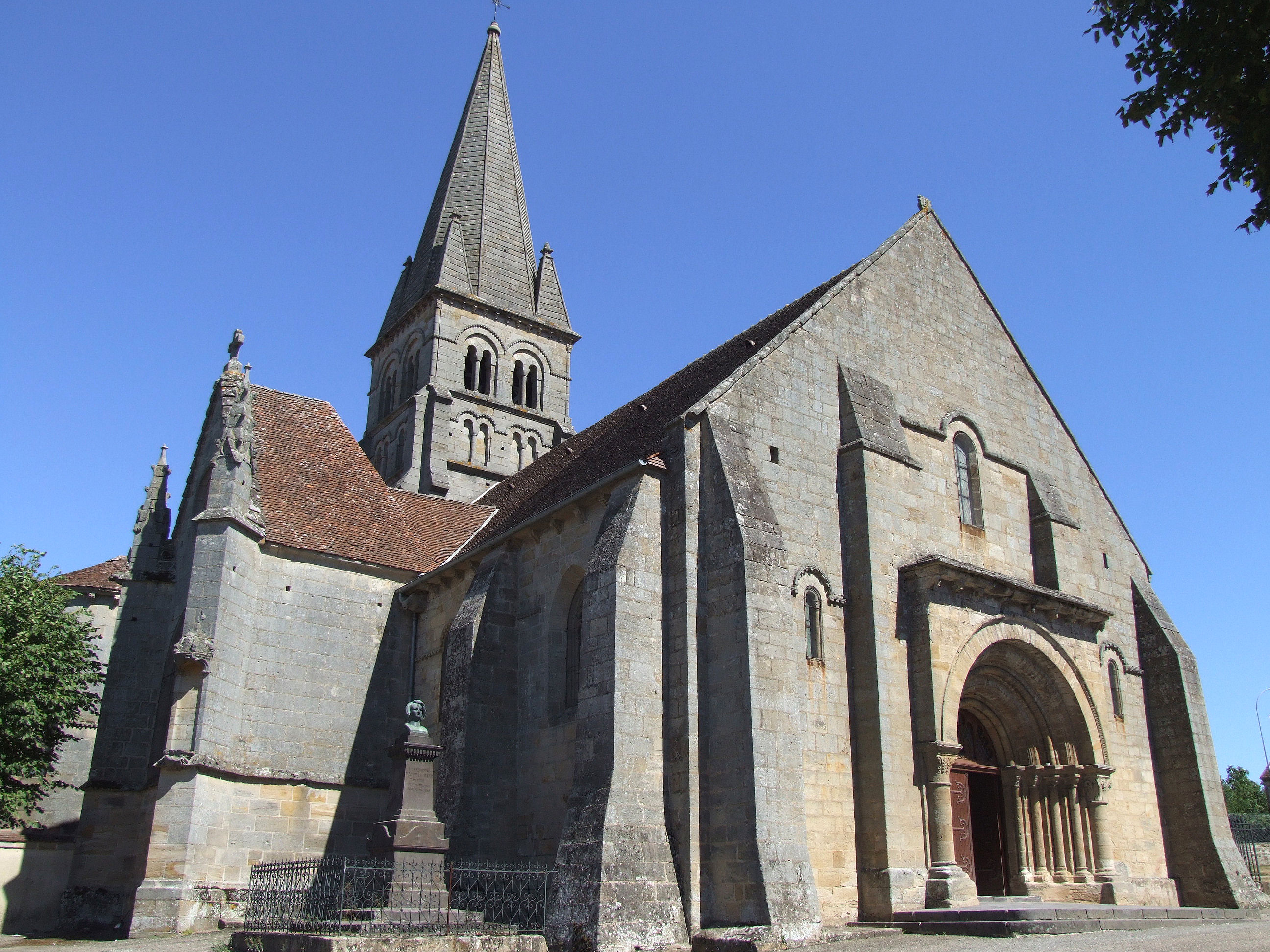 Bourbon-l'Archambault - Eglise Saint-Georges